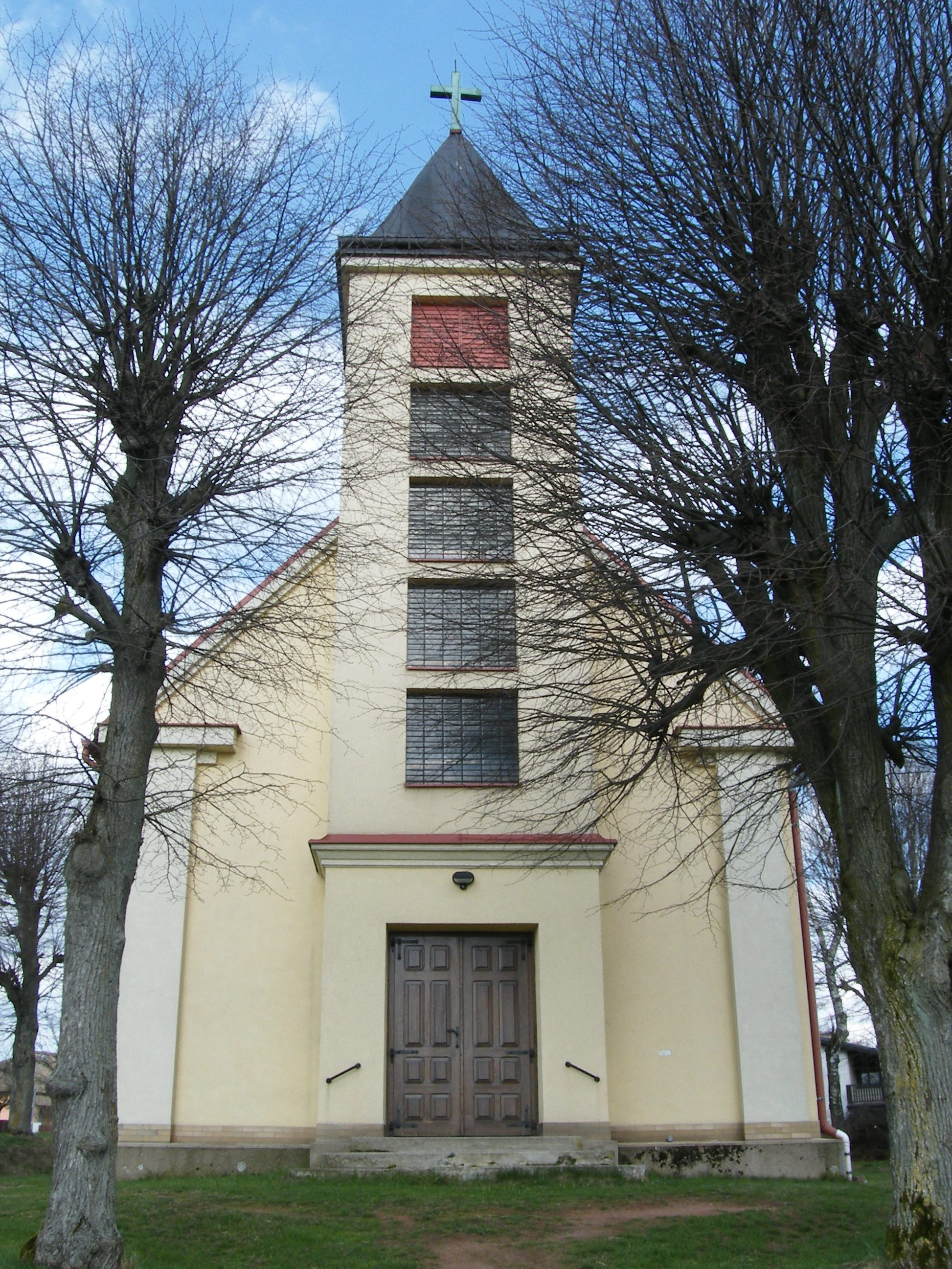 Kostel Božského Srdce Páně (Borová)